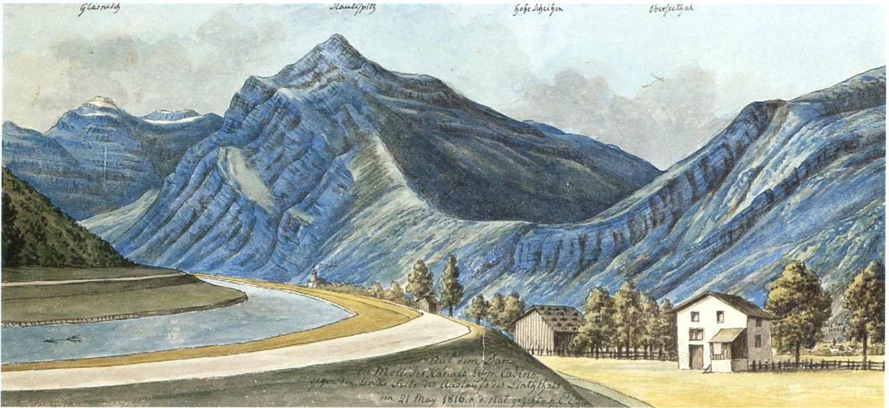 Aquarelle du canal de Mollis, à la sortie du lac de Wallenstadt, Suisse, par Hans Conrad Escher von der Linth, 21 mai 1816.